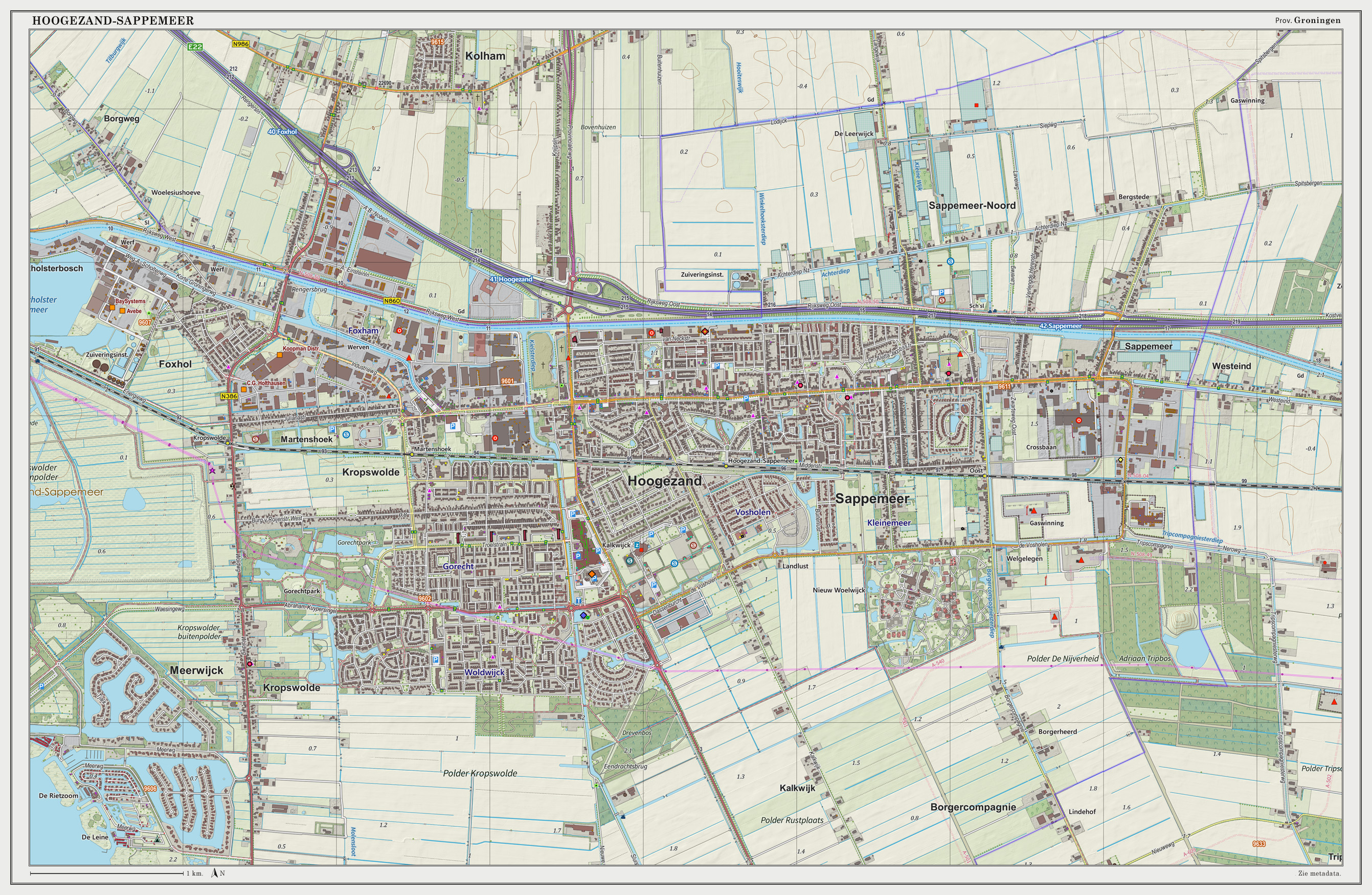 Topografische kaart van Hoogezand-Sappemeer (woonplaats). Resolutie: 300 pixels/km. Kaartbeeld samengesteld uit de open geodata van de Top10NL en Top25namen (Basisregistratie Topografie, Kadaster), Creative Commons BY licentie. Gebouwvlakken uit open geodata BAG extract. Wegen uit de OpenStreetMap. Reliëfschaduw uit de Actuele Hoogtekaart AHN2. Samenstelling en kleurenschema: Jan-Willem van Aalst, met QGIS2. Zie ook de Legenda.